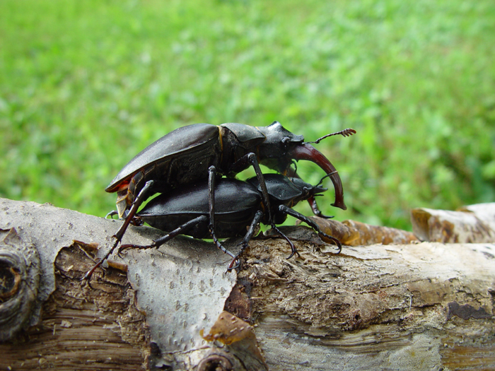 Paarung Hirschkäfer (Mating Stag beetles)